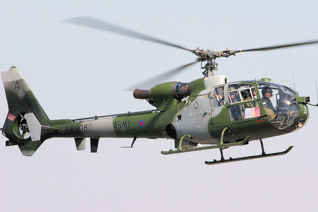 Gazelle - RIAT 2006